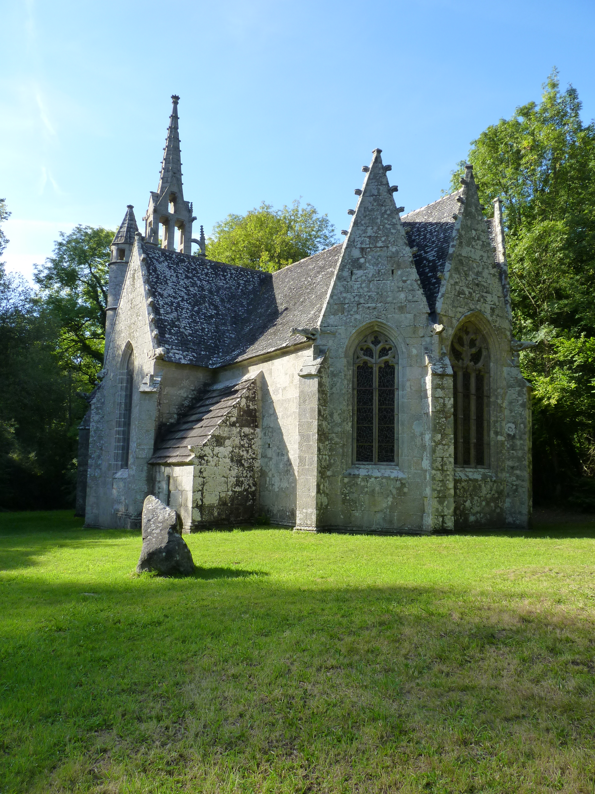 Chapelle du 15ème siècle entre Plufur et Trémel.